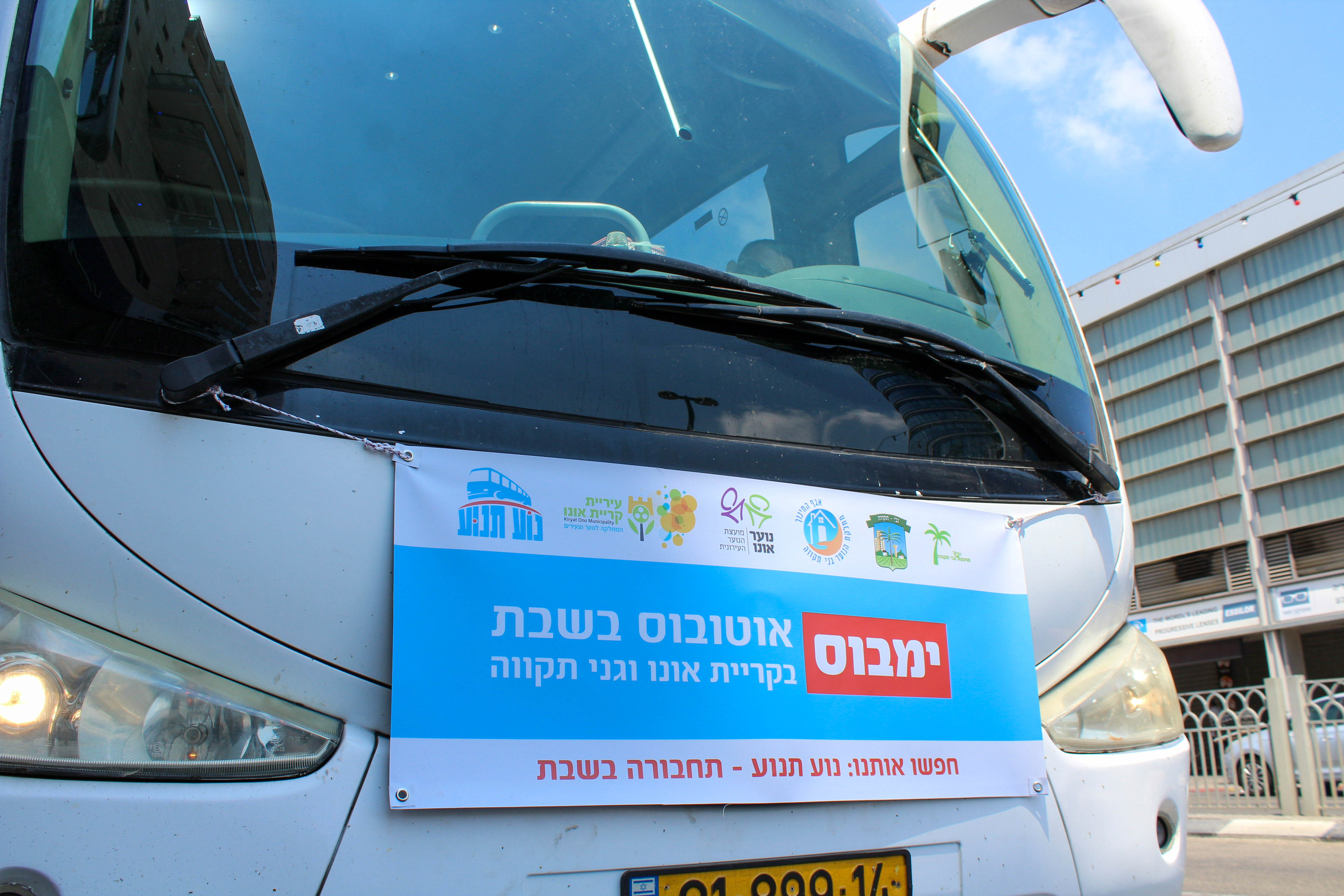 קו האוטובוס של עמותת נוע תנועה נועד לשרת את תושבי קריית אונו בנסיעה אל חוף הים בשבת